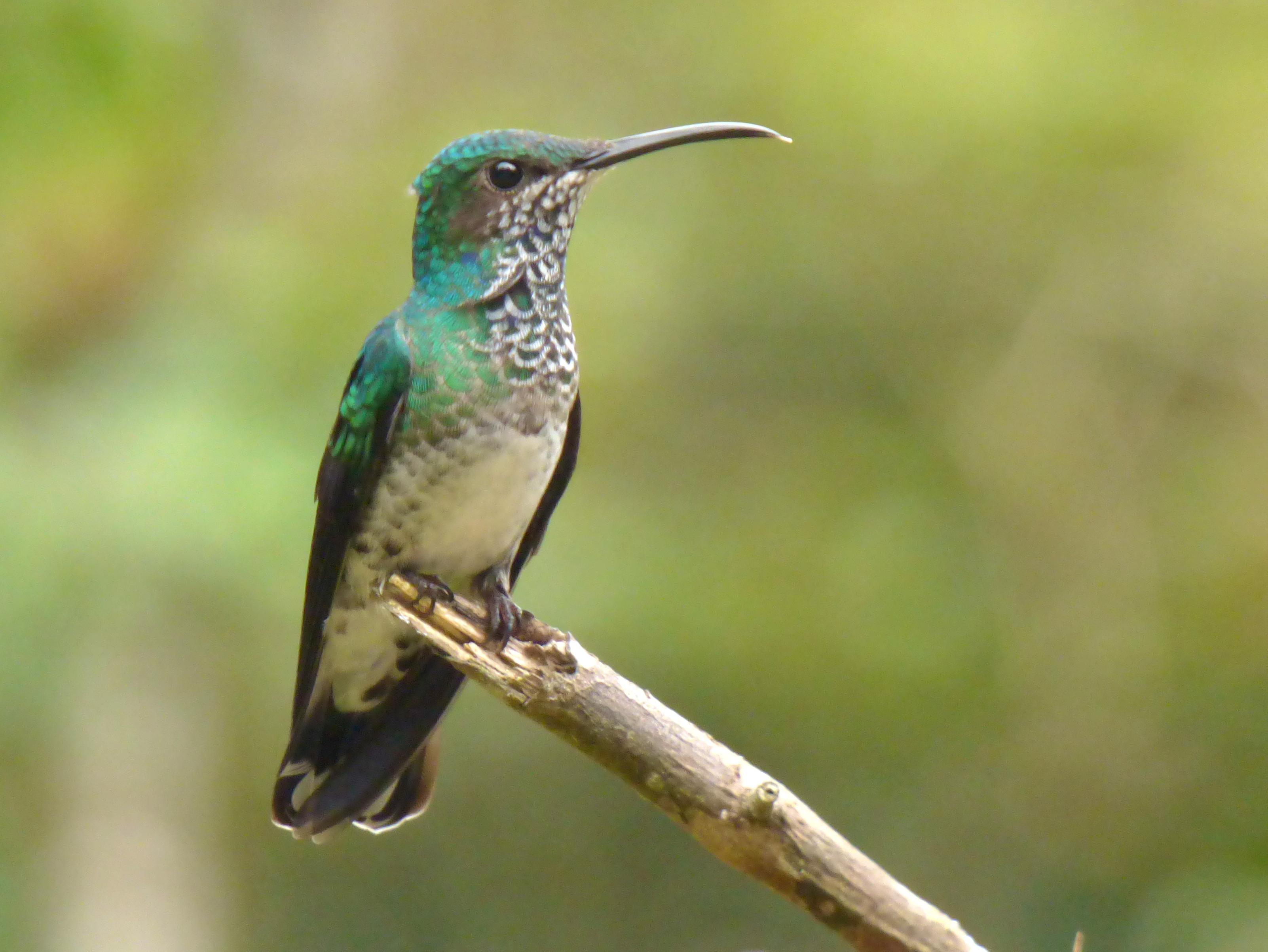 Florisuga mellivora (Colibrí collarejo) - Hembra